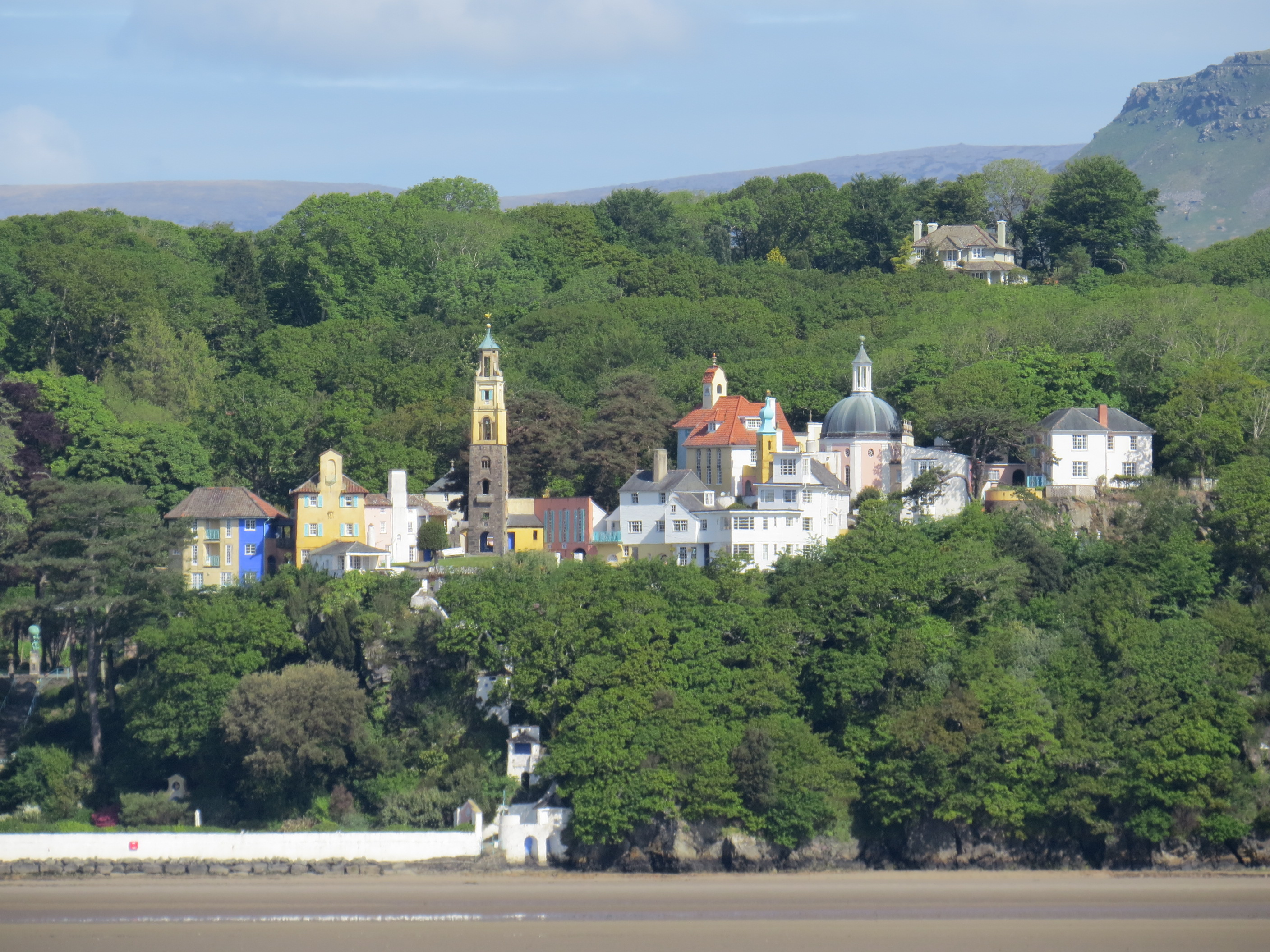 Portmeirion o Lanfihangel y Traethau